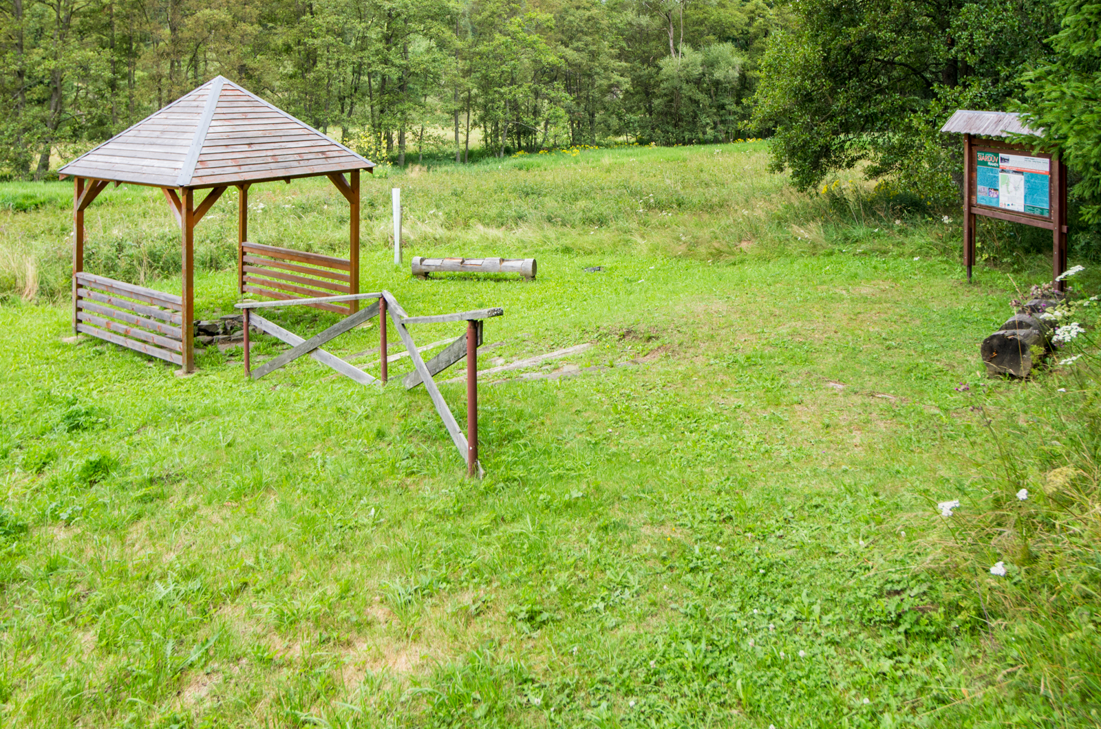 Siardův pramen, Mnichov, okres Cheb